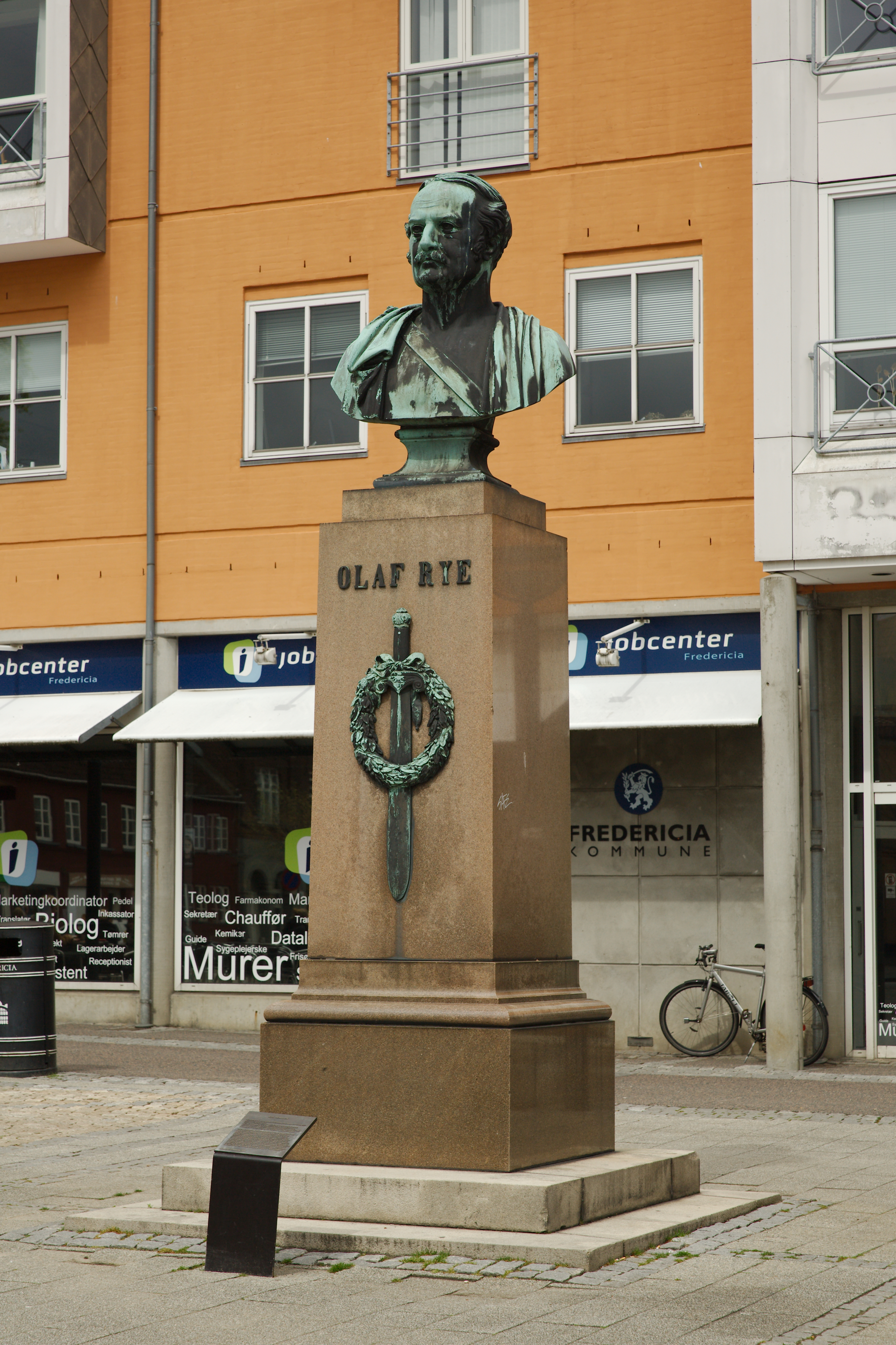 Olaf Rye statue på Ryes Plads i Fredericia